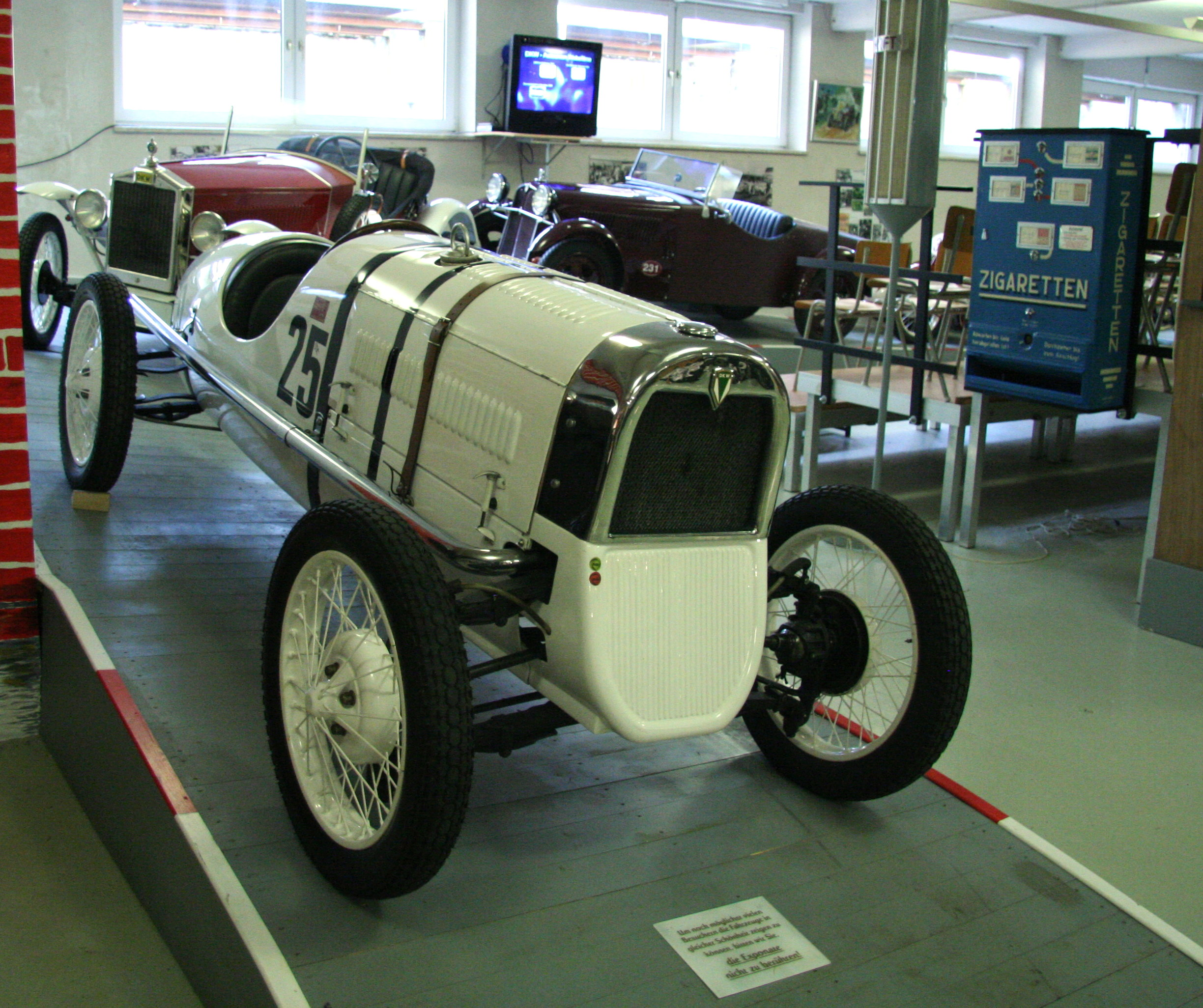 DKW Rennsportabteilung im Museum für sächsische Fahrzeuge in Chemnitz.